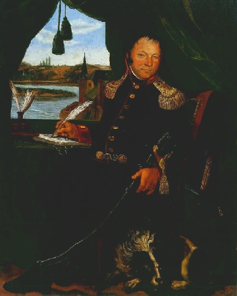 Stephan Hawich: Porträt Peter Marx, Öl auf Leinwand, um 1816/17 (Stadtmuseum Simeonstift Trier)